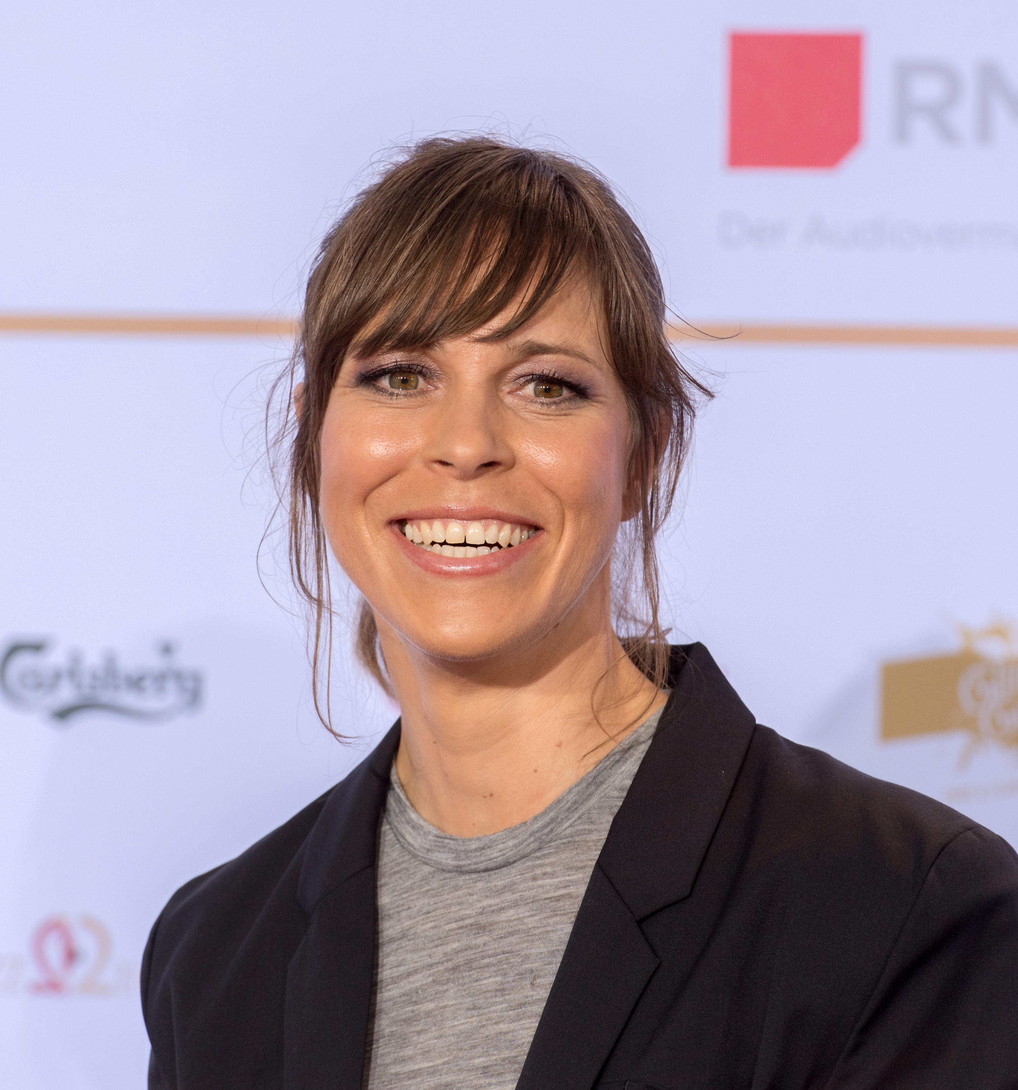 Anneke Kim Sarnau beim Deutschen Radiopreis 2016 im Schuppen 62 in Hamburg